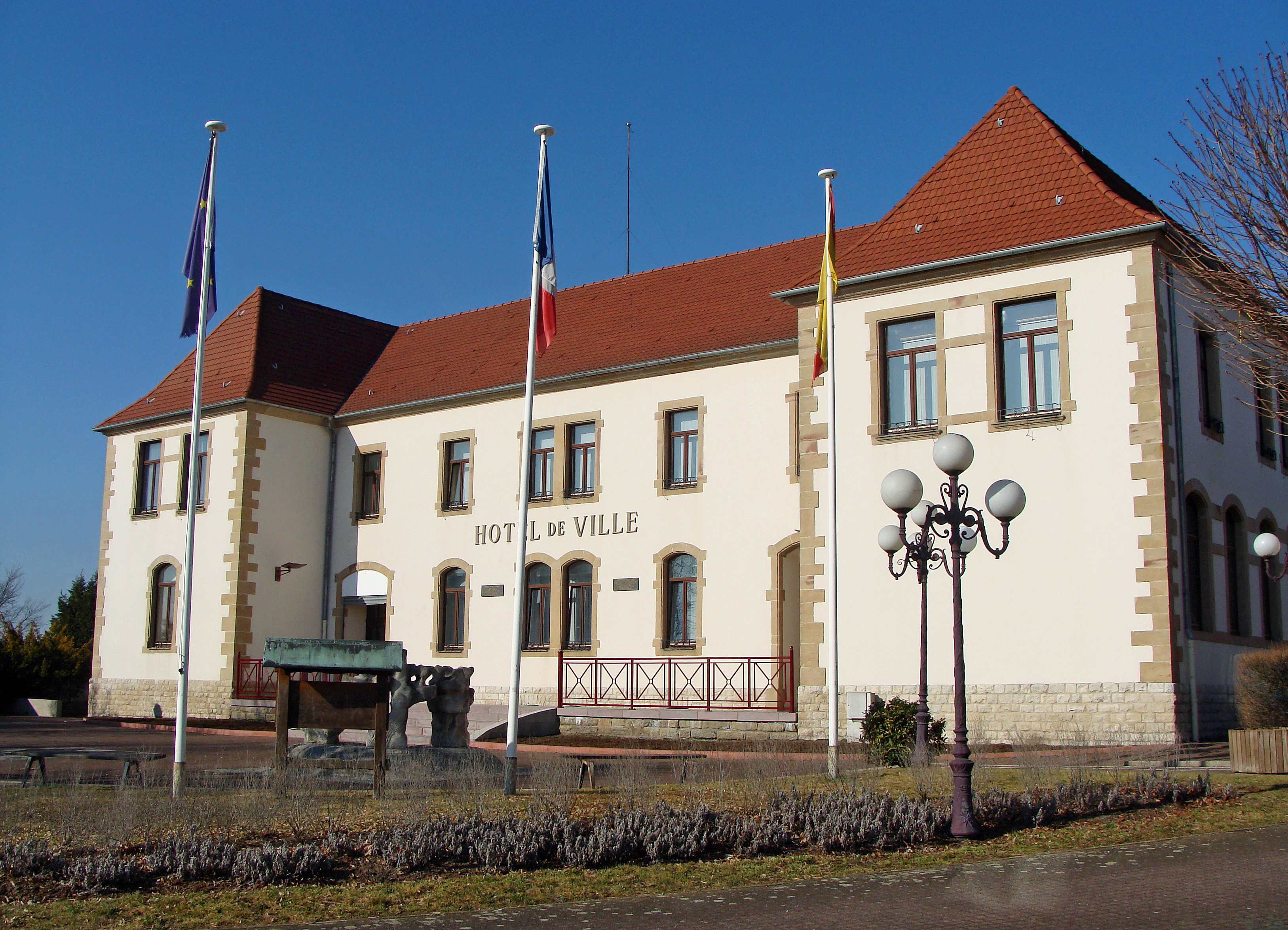 L'Hôpital (Moselle). Hôtel de Ville. Mairie.